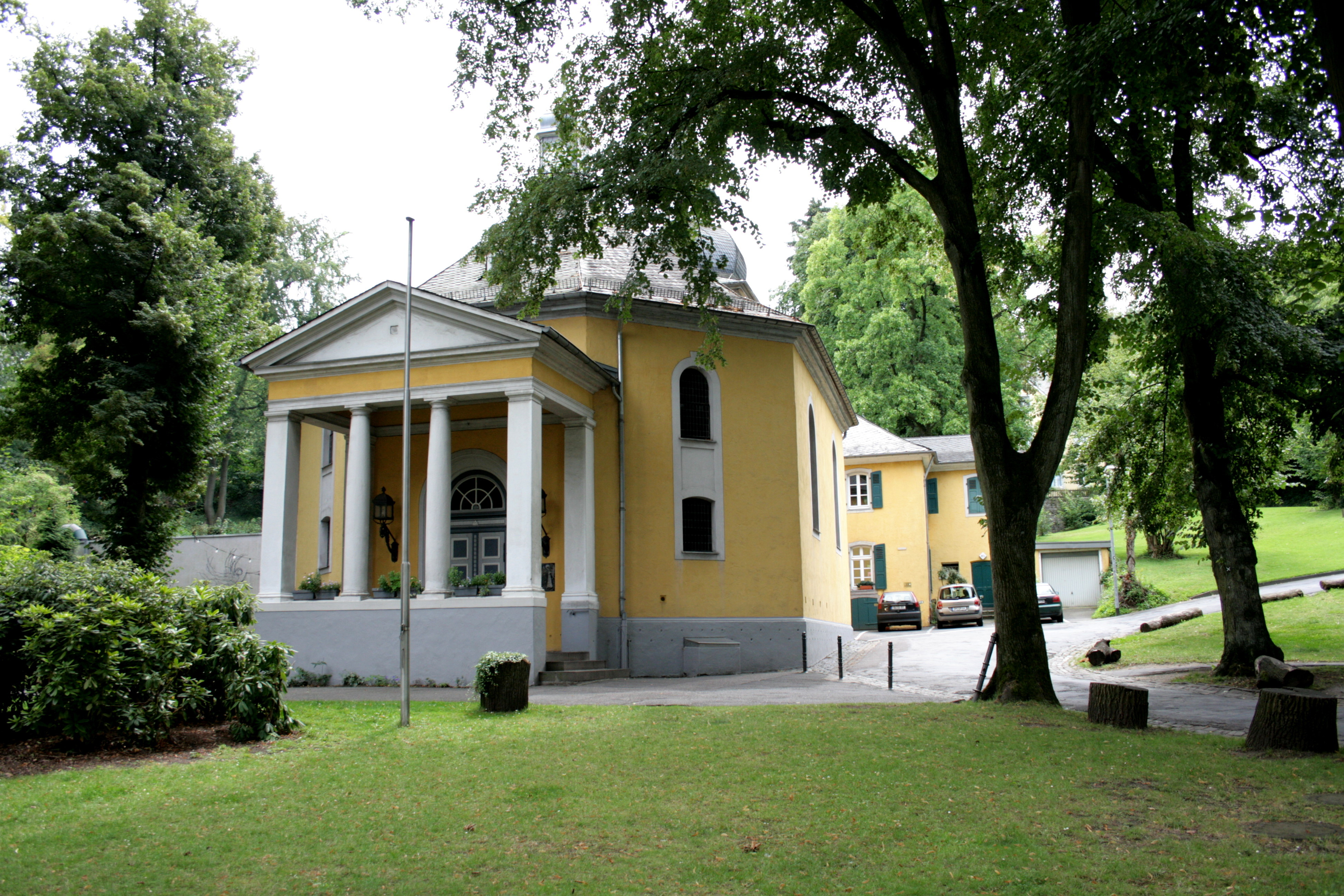 Evangelische Gnadenkirche, Hauptstraße 264 in Bergisch Gladbach